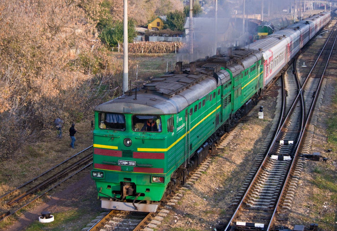 Поезд Москва-Кишинёв в Тирасполе